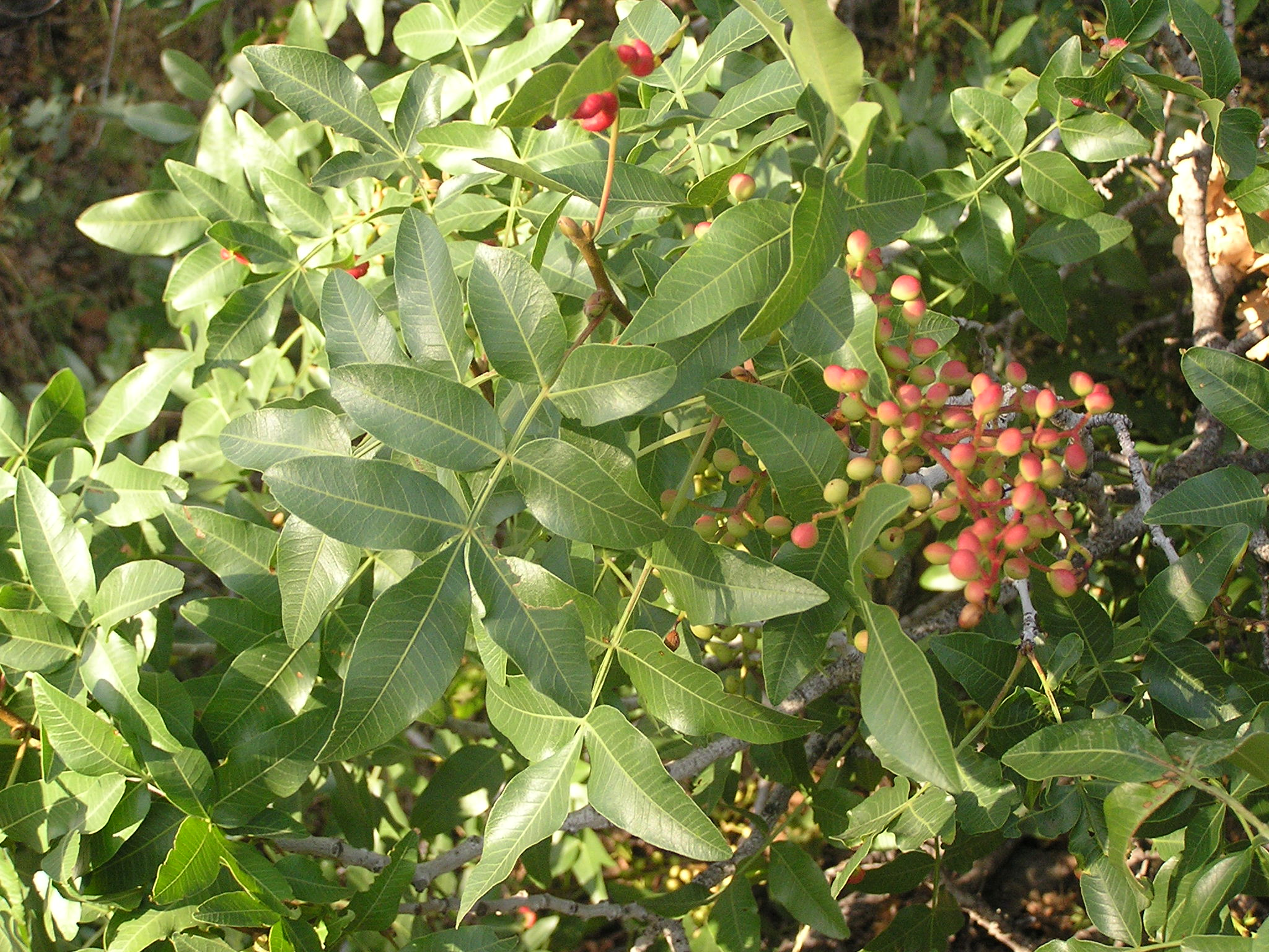 Растение